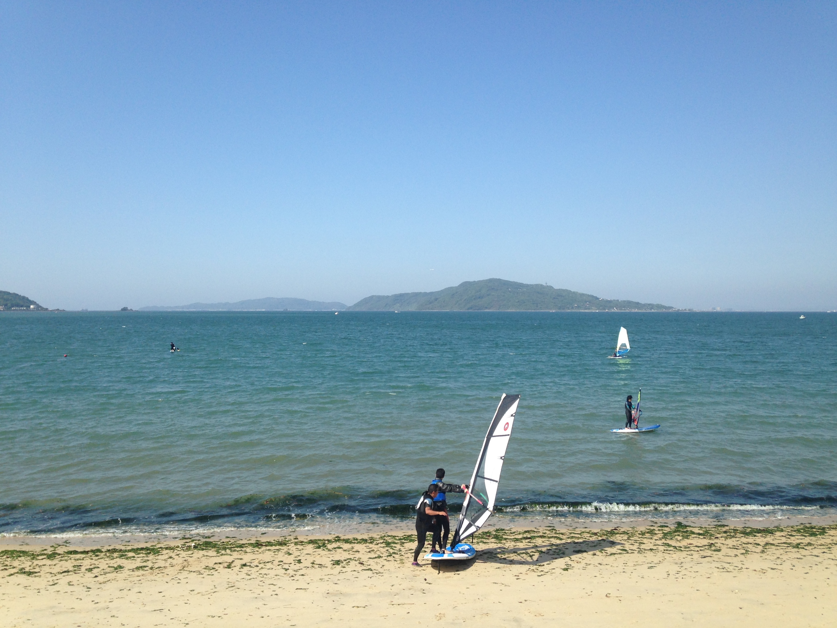 長垂ビーチより望む能古島と志賀島